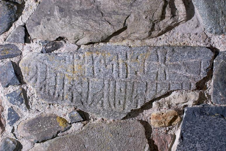 Runstensfragment, inmurat i Strö kyrkas fasad Motiv: Vg47 Strö Nyckelord: Runor Kategori: (01) Exteriörer, detaljer, Runristning/runsten Runstensfragment, inmurat i Strö kyrkas fasad.